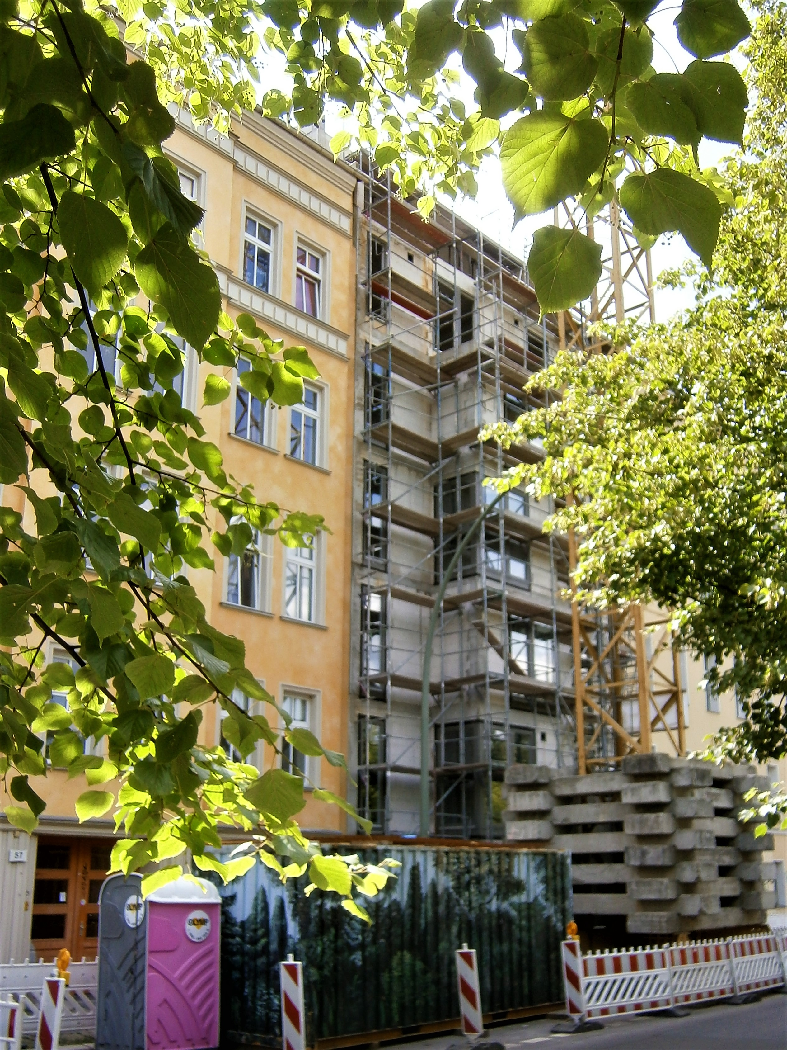 Die Friedenstraße ist eine Straße im Berliner Bezirk Friedrichshain-Kreuzberg, Ortsteil Friedrichshain. Angelegt und benannt wurde sie 1871-1876 auf dem Communicationsweg außerhalb der abgerissenen Berliner Zollmauer. Bereits seit dem Anlegen und der Bebauung bestand eine Teilung der Straße auf Königstadt und Stralauer Viertel. Aktuell sind es drei unterschiedene Straßenabschnitte: regionale Straßenverbindung im Barnimkiez am Volkspark Friedrichshain, am Platz der Vereinten Nationen als Parkzone, südlich im (Planungsraum) "Friedenstraße" als Ergänzungsstraße. Das Bild zeigt den Bau der Lückenschließung 2017 in der Straßenfront auf Grundstück Friedenstraße 56. In der Blocktiefe bestand ein Querbau Friedenstraße 55/57, jedoch das einzelne im Zweiten Weltkrieg zerbombte Haus an der Straßenfront war bislang nicht ersetzt worden.